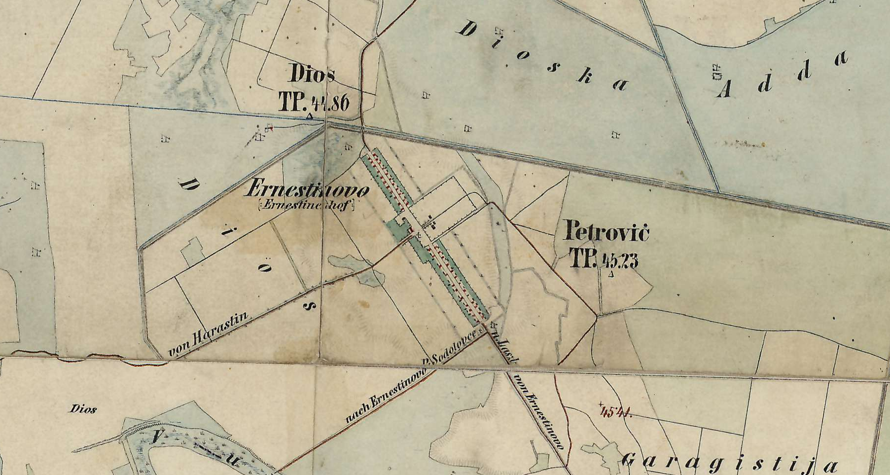 Karta Ernestinova iz 19. stoljeća